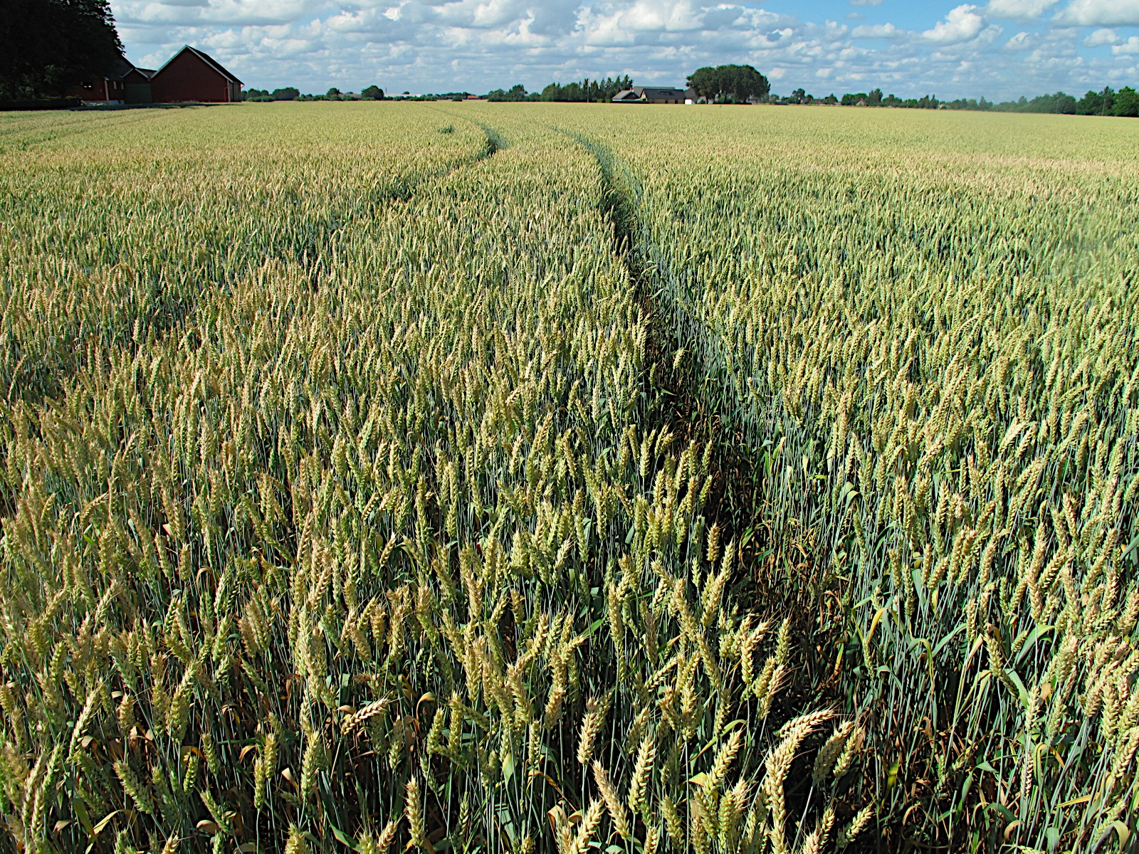 Wheat fields at Nöbbelöv, Lund